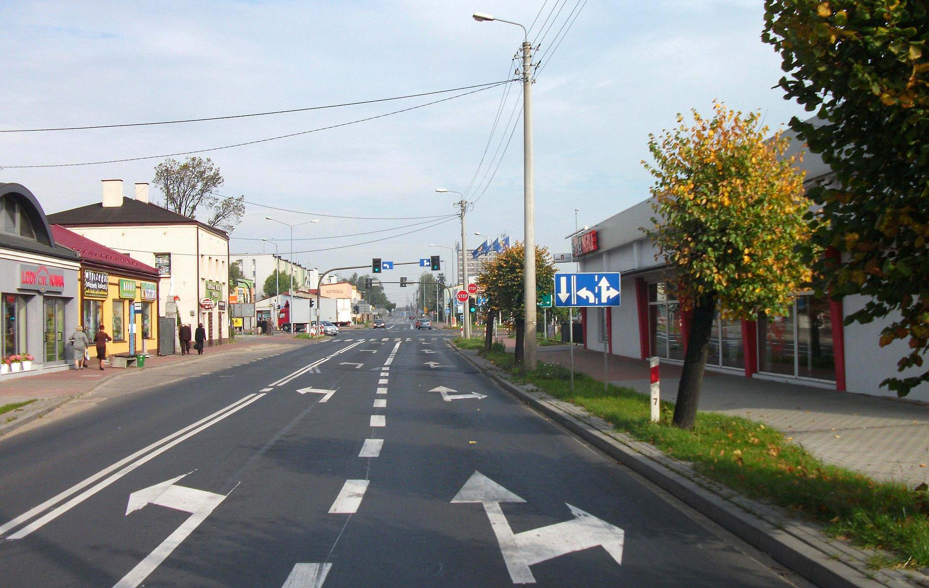 Ul. Sieradzka